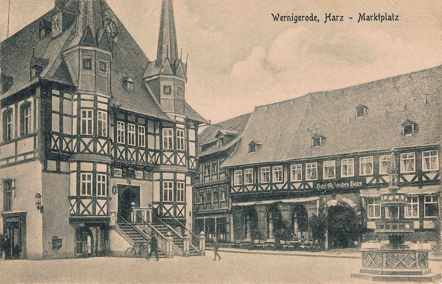 Rathaus und Hotel Gothisches Haus auf dem Marktplatz in Wernigerode.